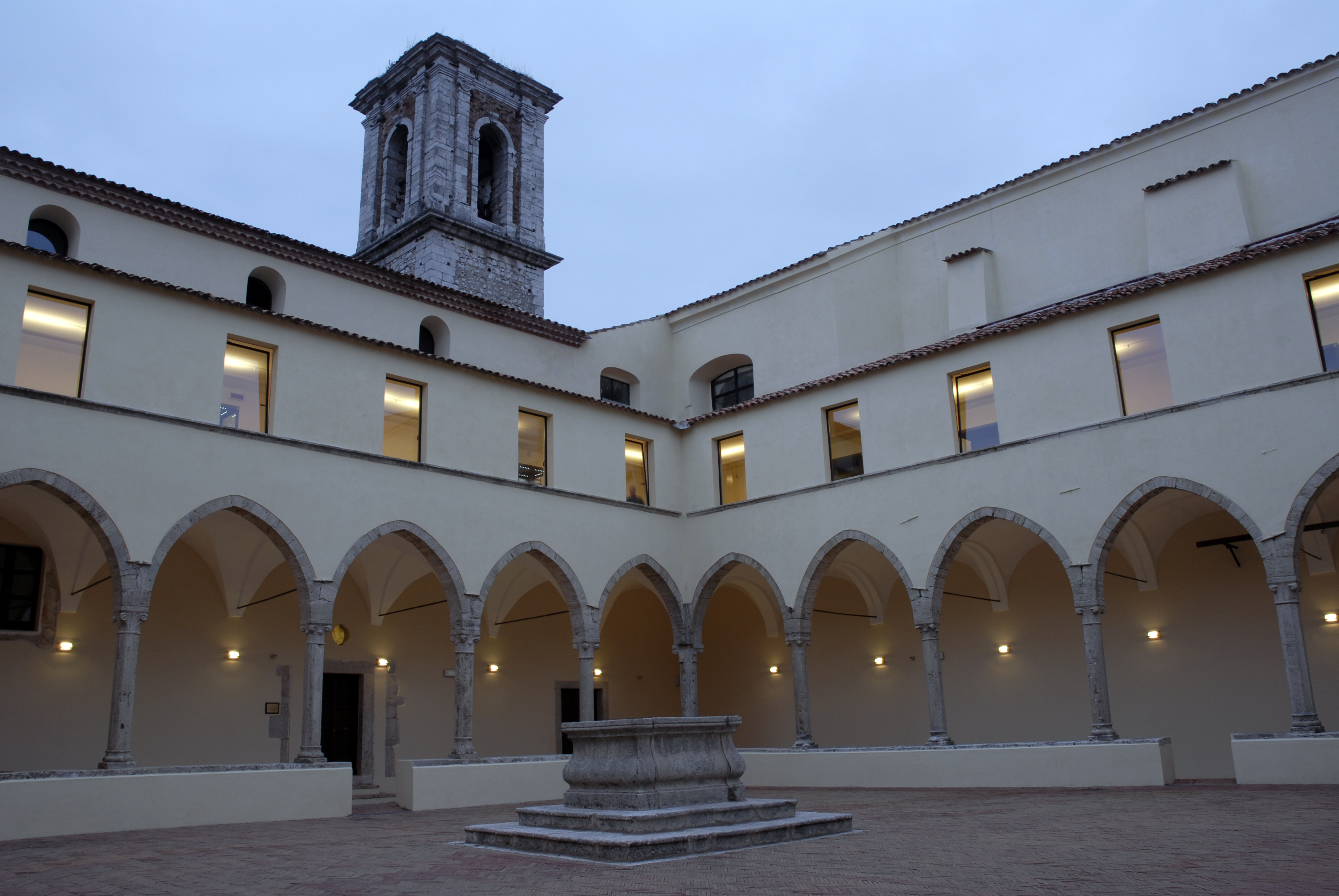 Interno del chiostro degli Eremitani di Sant'Agostino